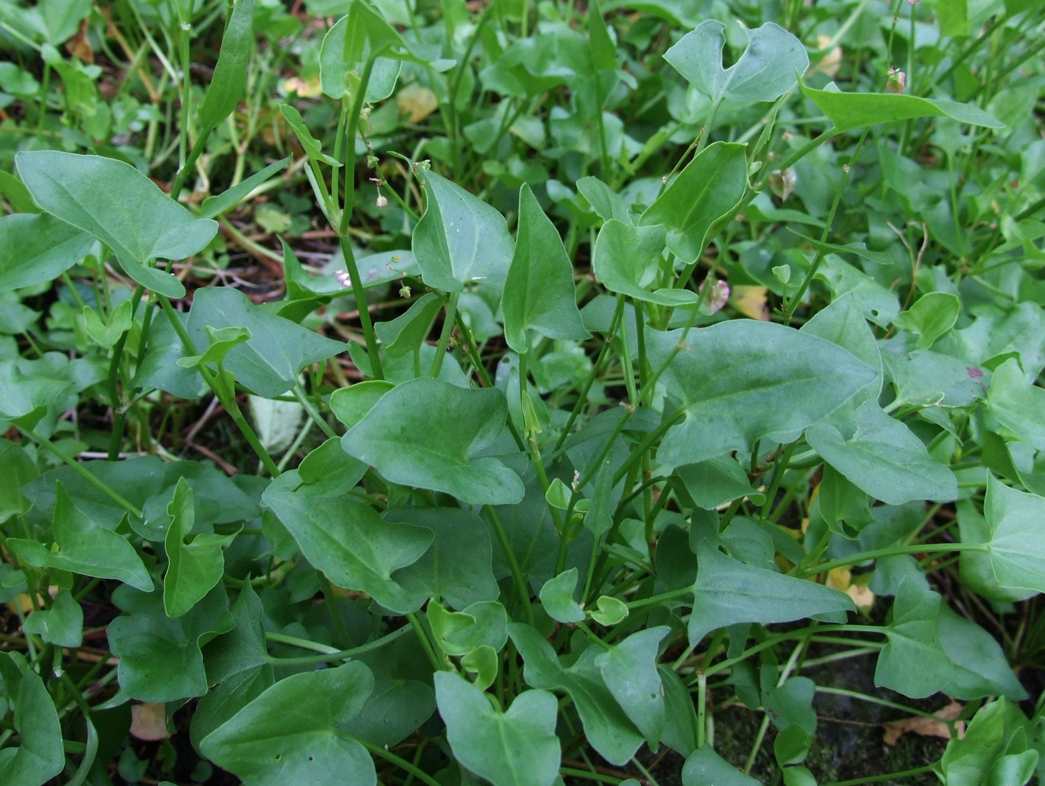 Rumex scutatus (pl. szczaw tarczolistny)